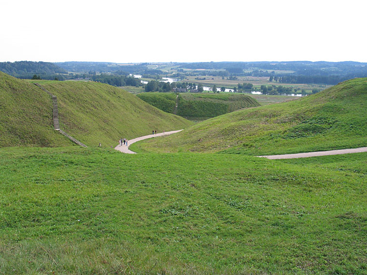 Kernavė, Blick auf die Burghügel und das Tal der Neris (Original text: Kernavė, Blick auf die Burghügel und das Tal der Neris)